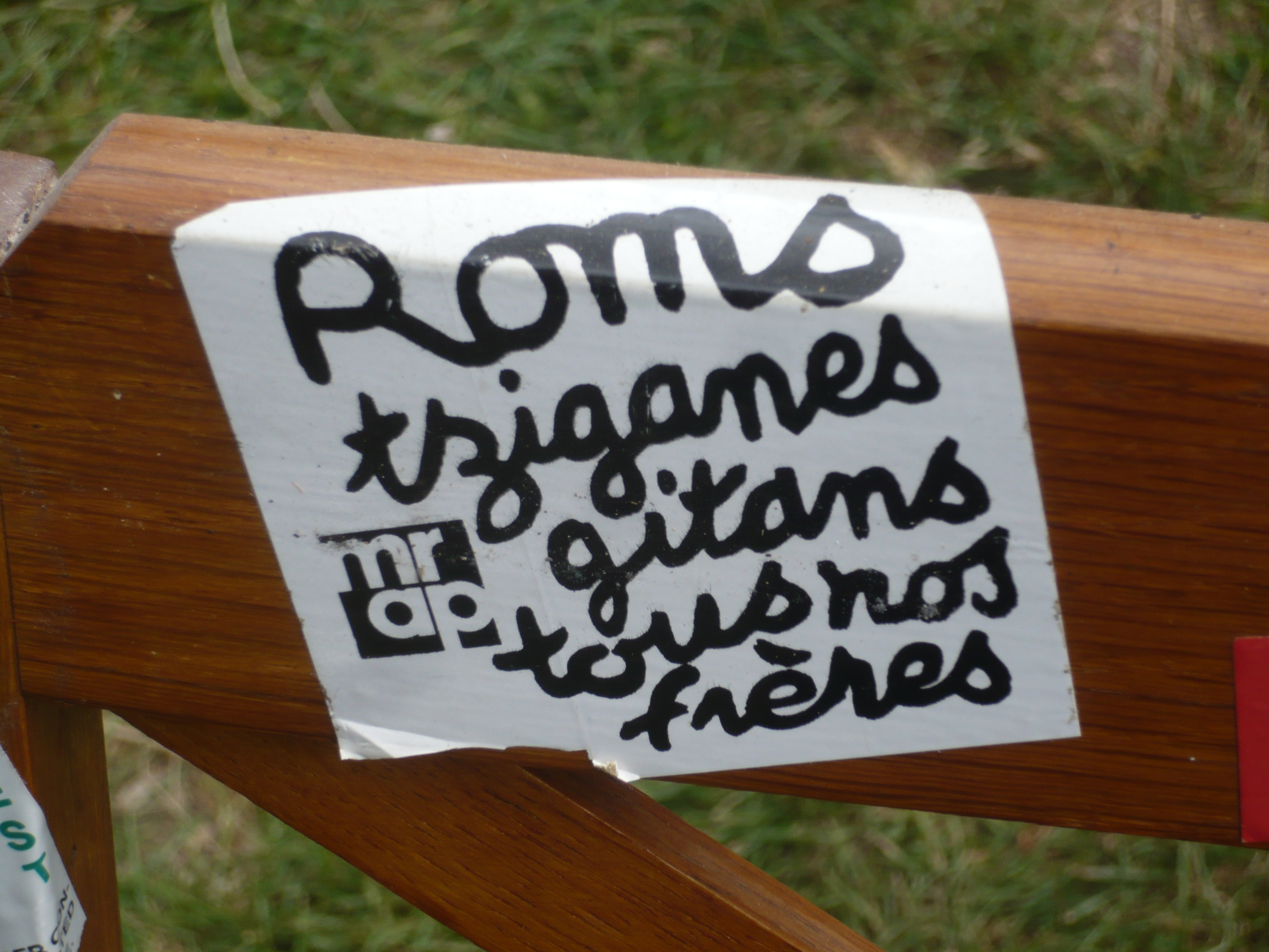 Un autocollant du MRAP (mouvement contre le racisme et pour l'amitié entre les peuples) datant des années 1980.